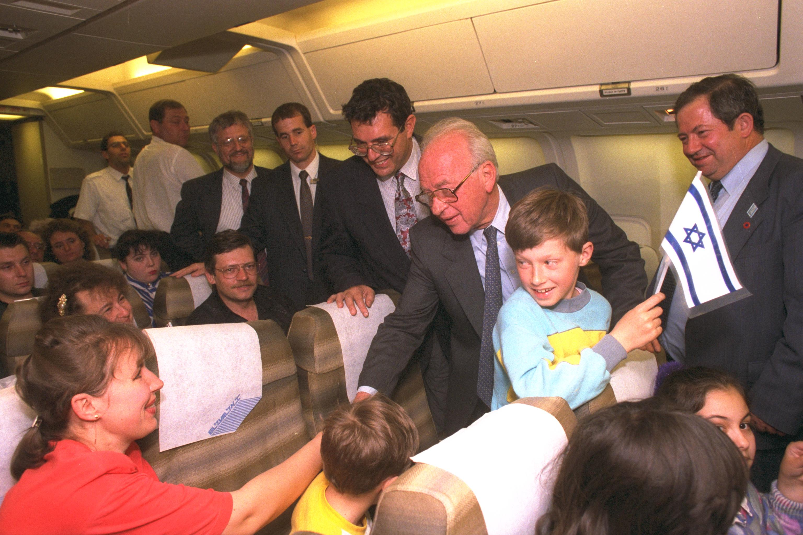 Prime Minister Yitzhak Rabin shakes hands with new Russian immigrants on their flight from Russia to Israel. ראש הממשלה יצחק רבין לוחץ ידי עולים חדשים מרוסיה אשר עלו לישראל במטוסוכשעשה דרכו חזרה מביקור רישמי במוסקבה. מימין, יור הקרן קימת לישראל יחיאל לקט. Photo: OHAYON AVI, 04/27/1994